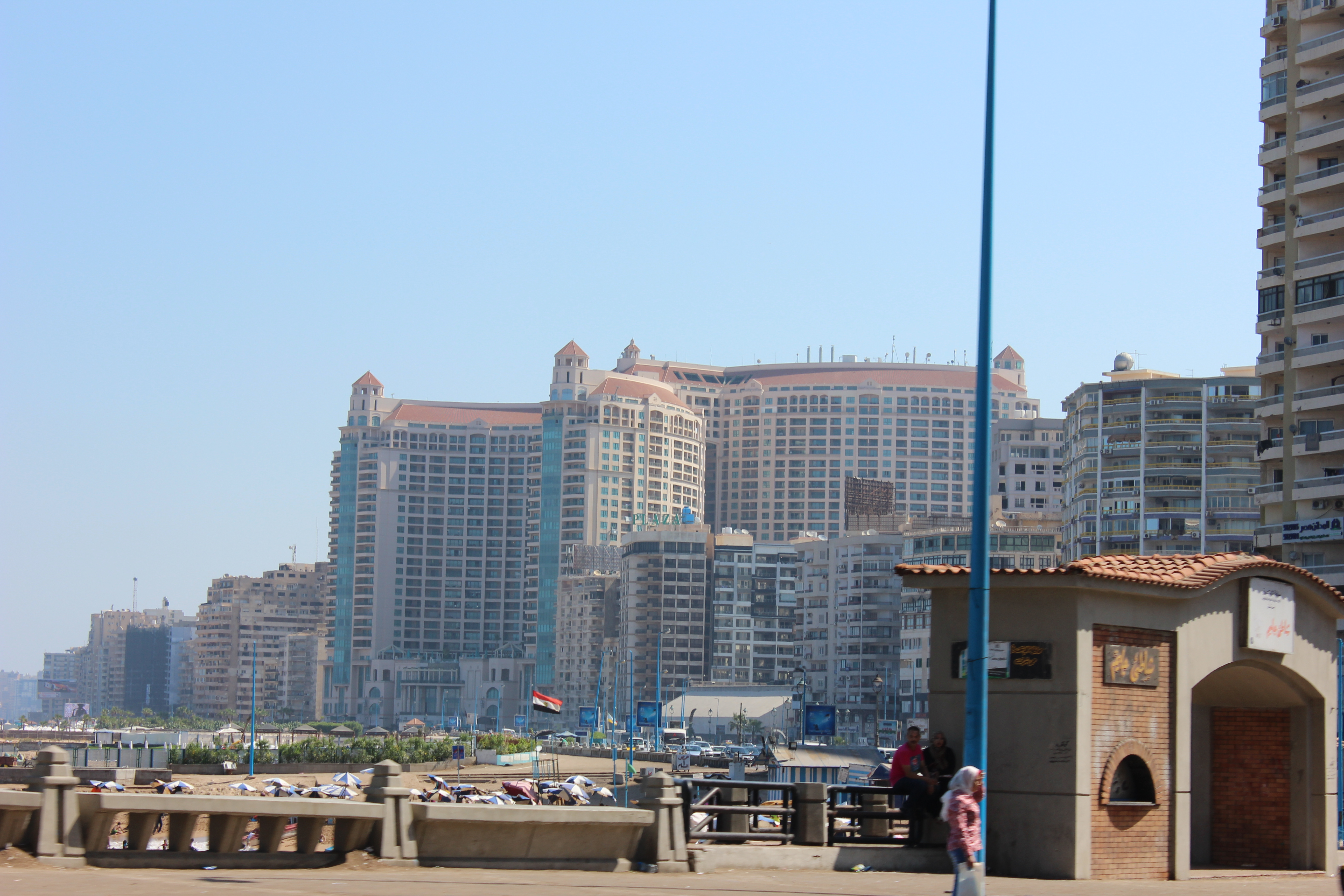 مباني الإسكندرية وبعض العلامات المميزة.